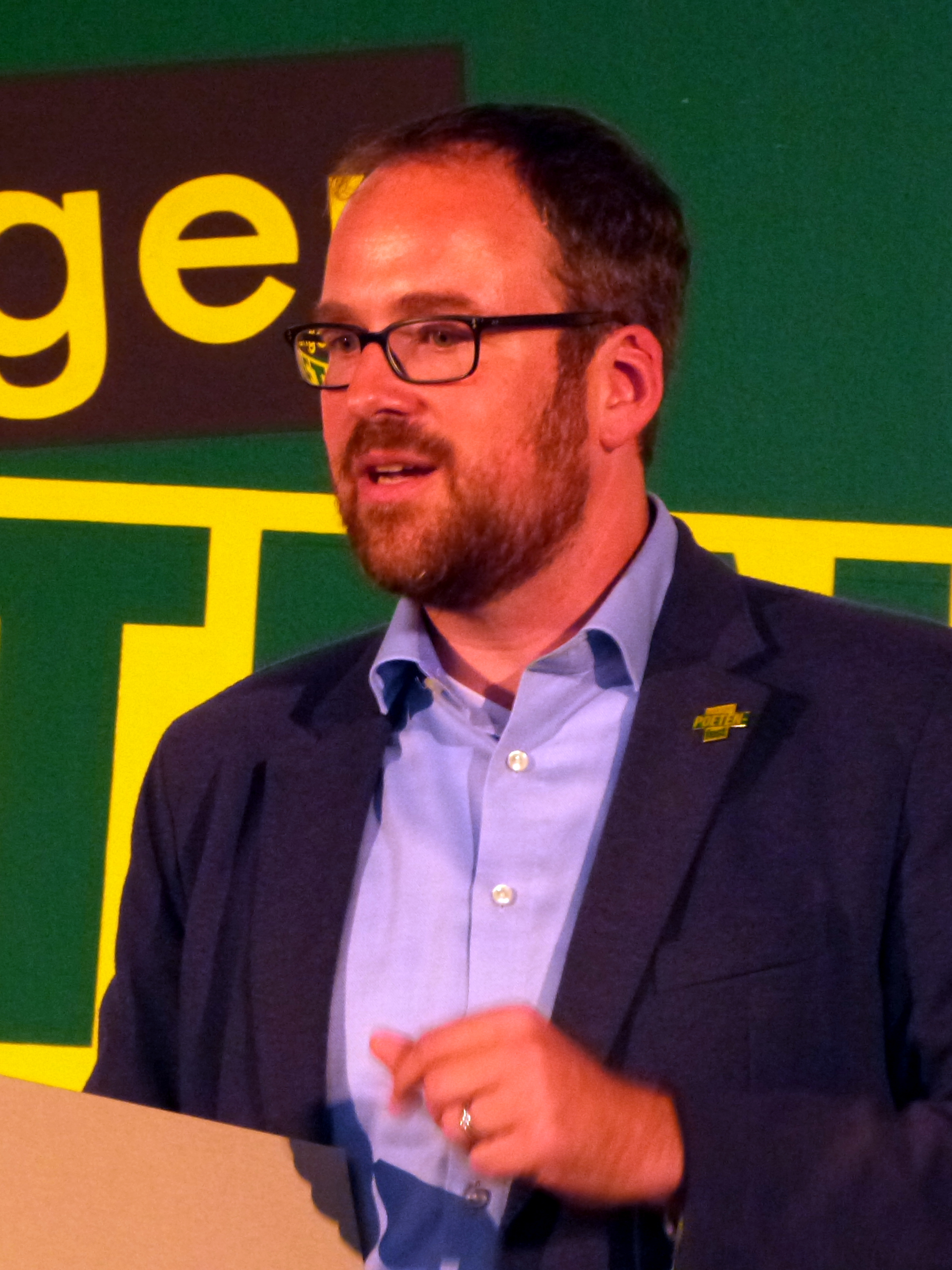 Der Erlanger Oberbürgermeister Florian Janik auf dem Erlanger Poetenfest 2019.